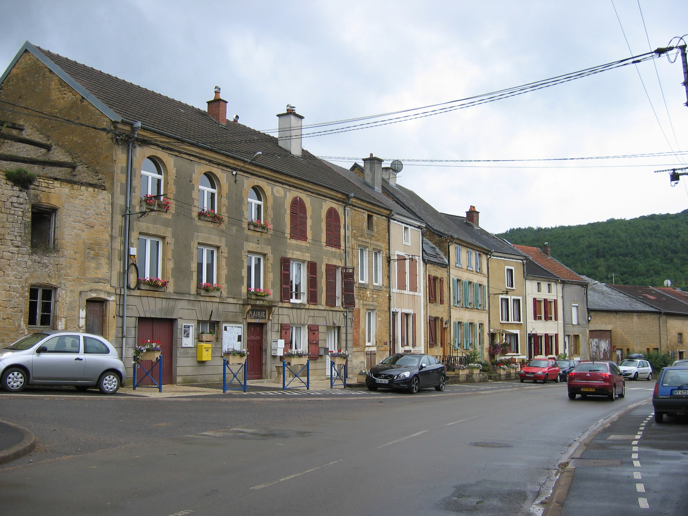 mairie Angecourt Ardennes France